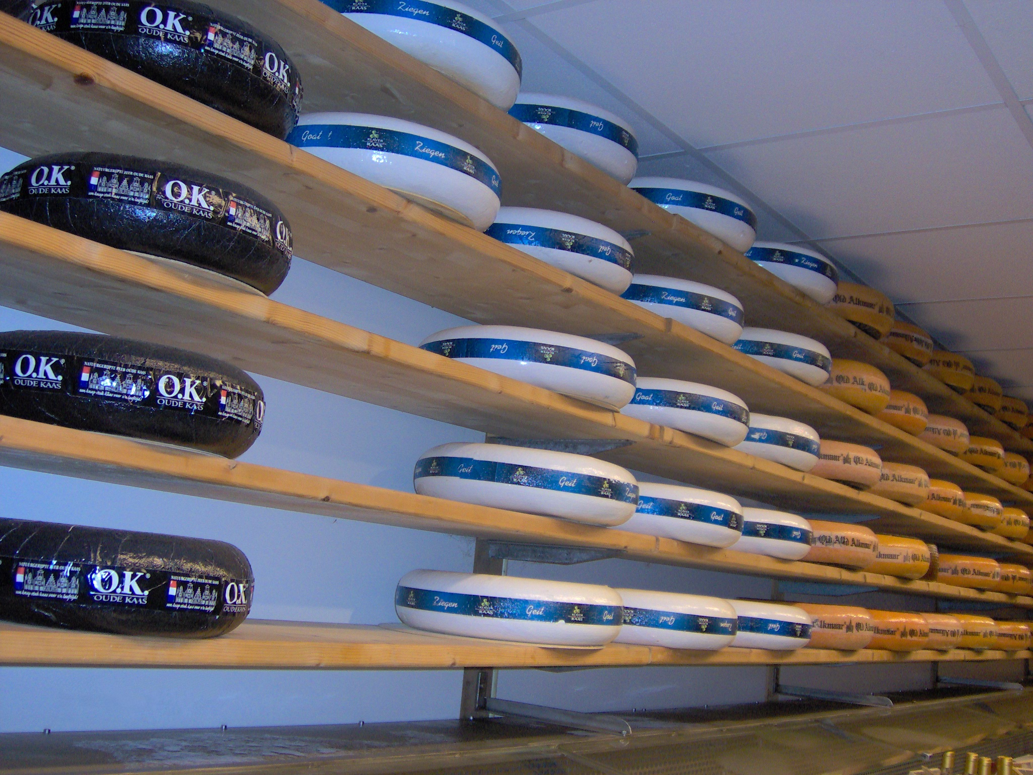 Gouda Cheeses